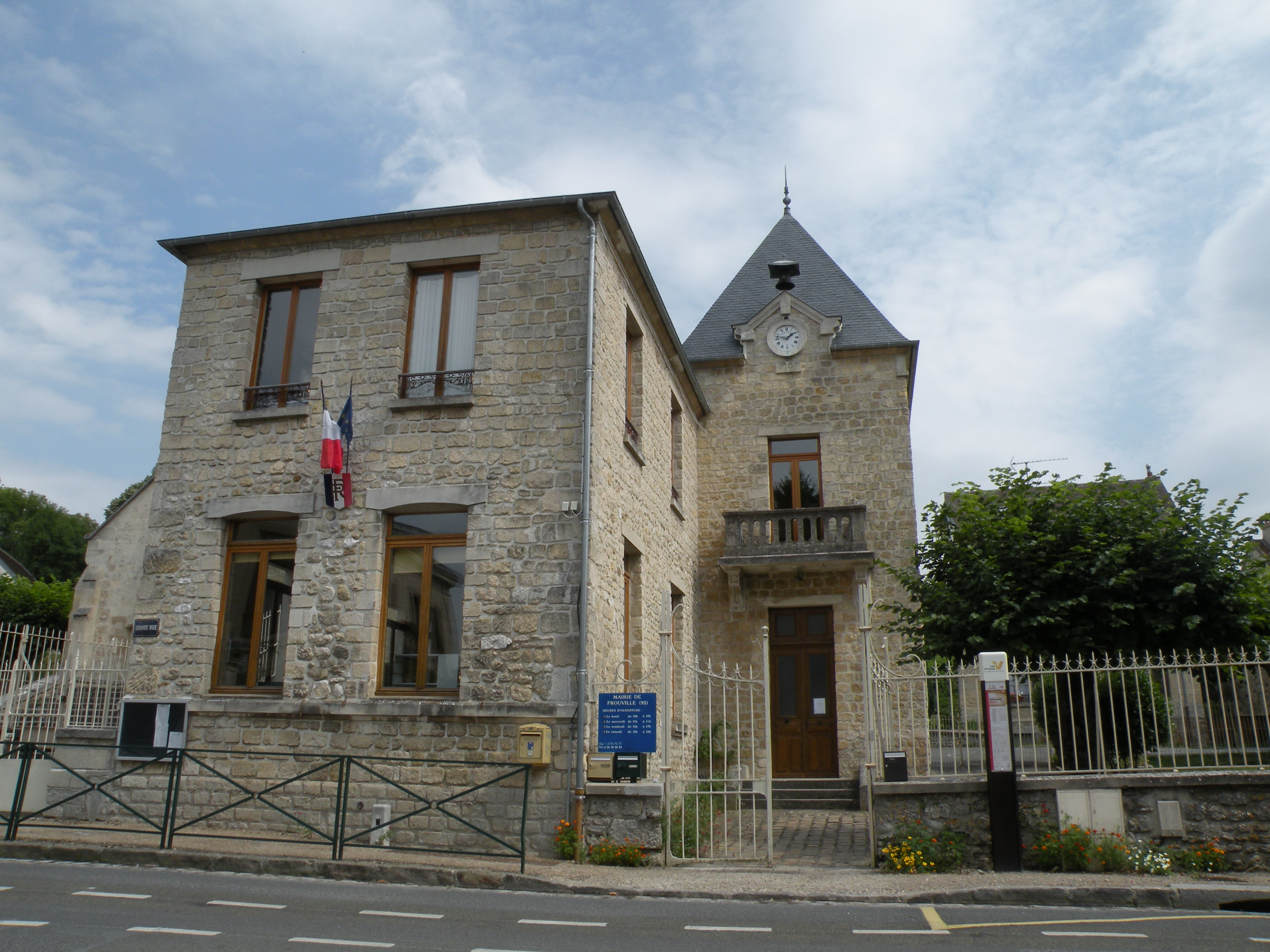 mairie de Frouville, val d'oise france